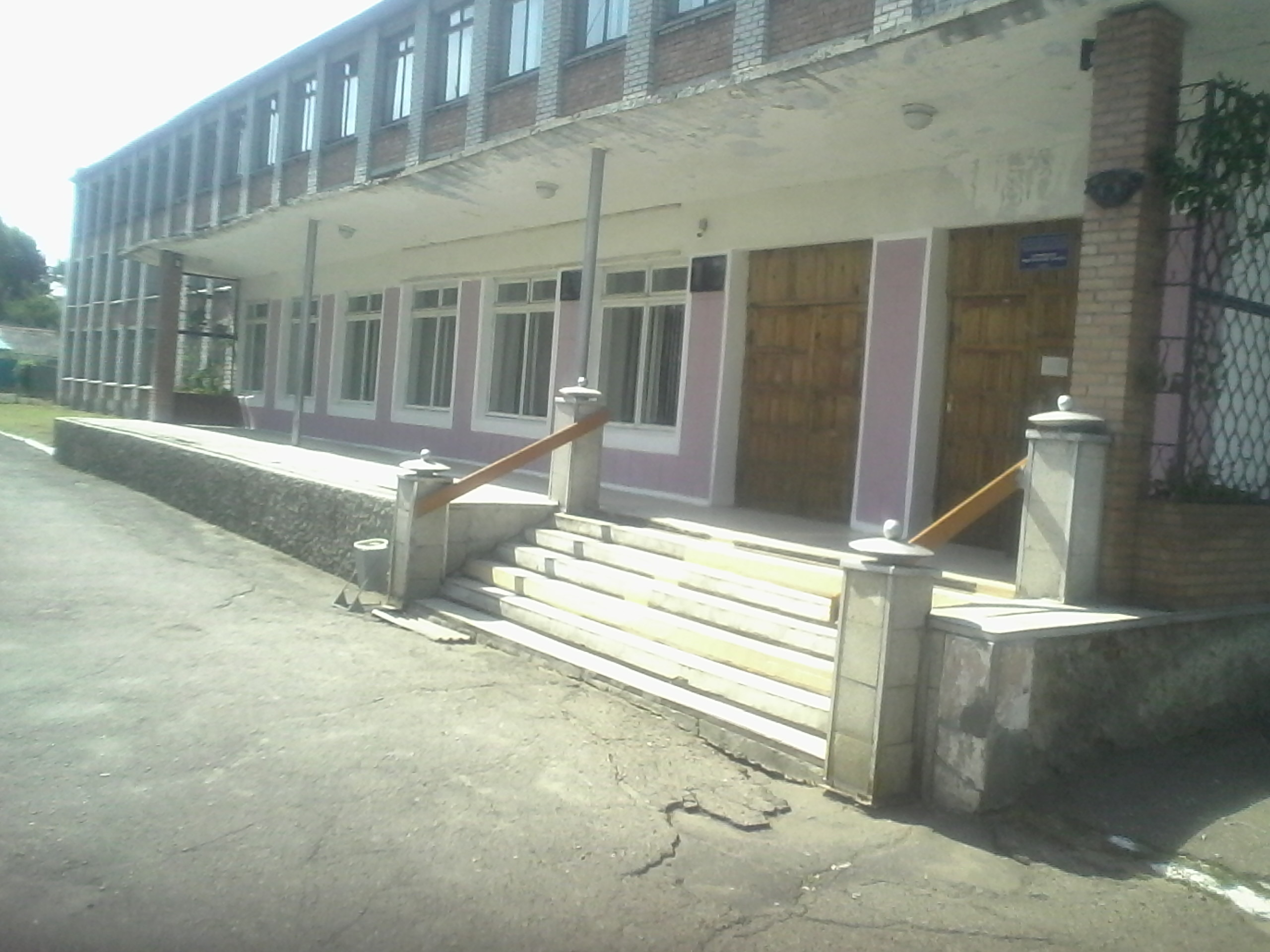 Учебный корпус